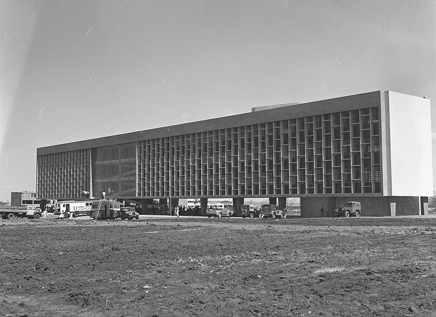 Imagem do Fundo Agência Nacional, do Arquivo Nacional